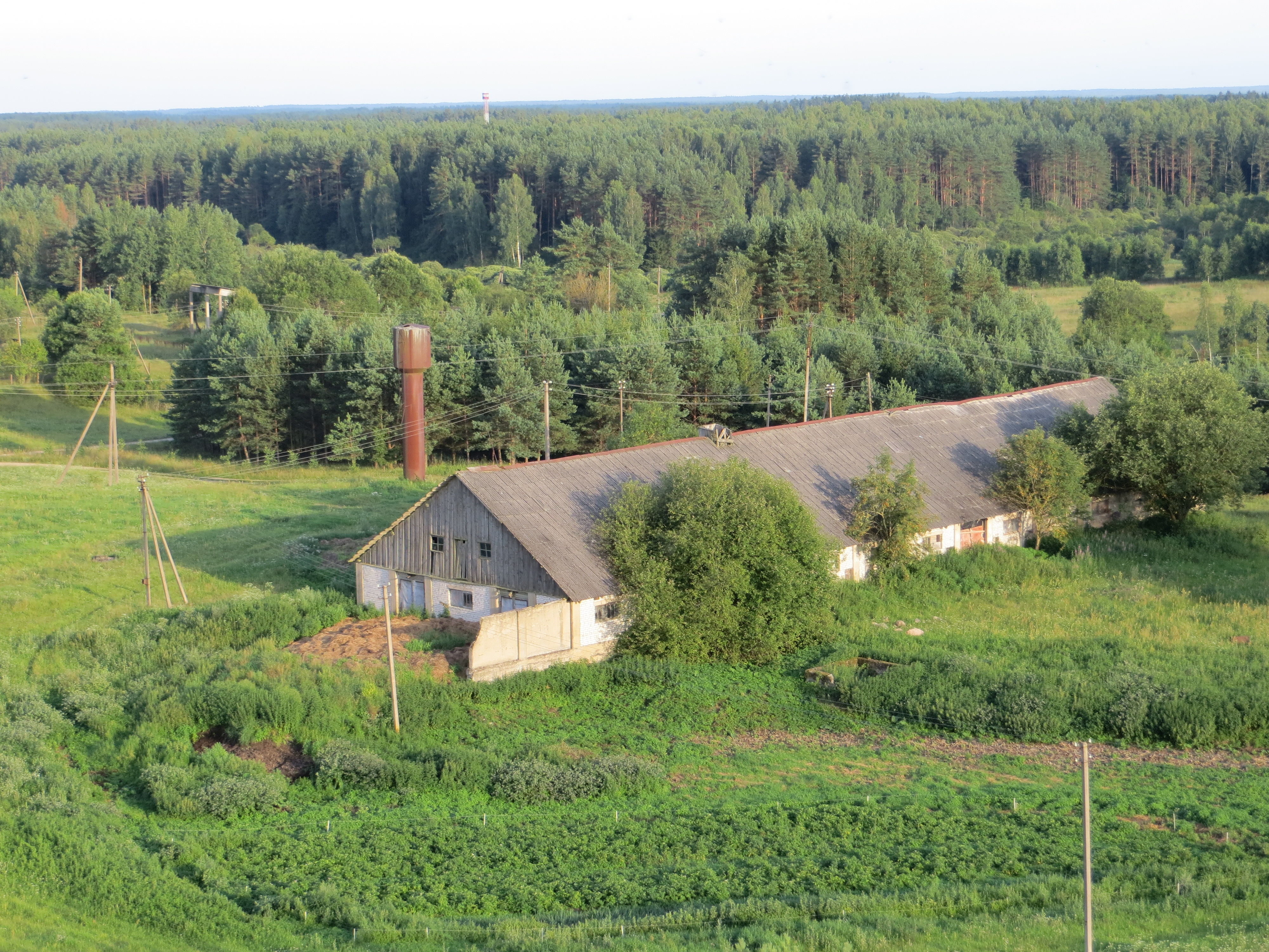 Kuktiškės, Lithuania